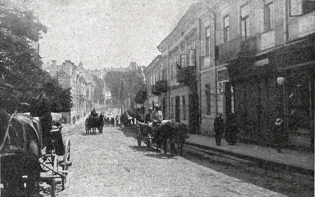 Улица Стрийская в Дрогобыче, слева видна реформистская синагога Осе Хесед.